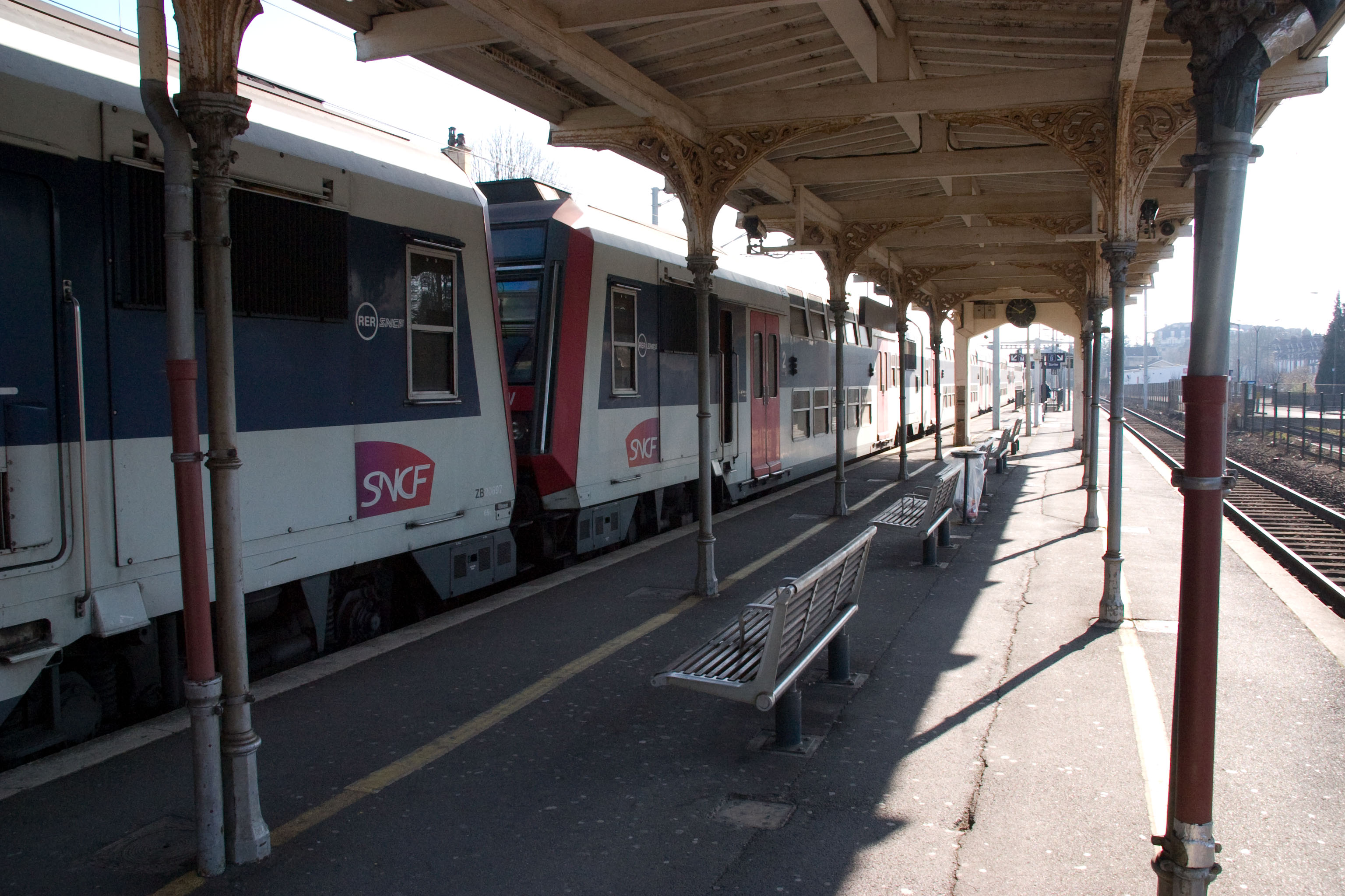 Gare de Chantilly - Gouvieux, Chantilly, département de l'Oise (France)